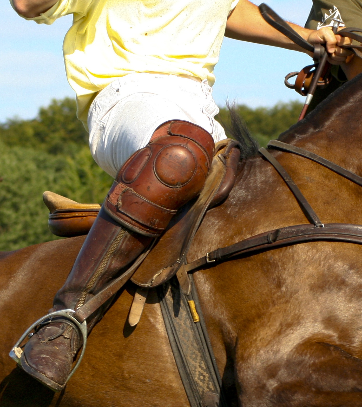 Polo kneepad